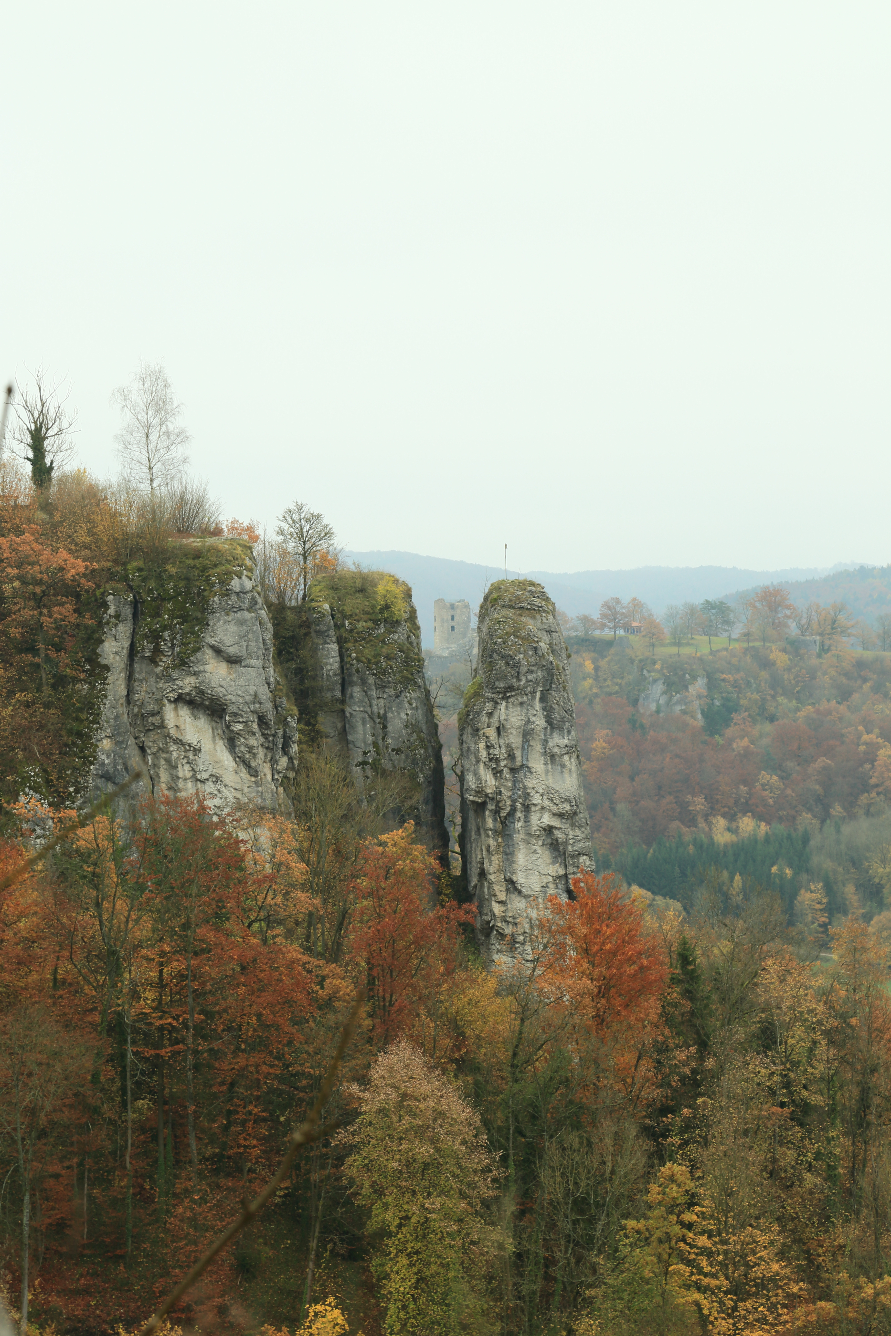 Felsnadel "Langenstein" bei Streitberg Geotop-Nummer: 474R020